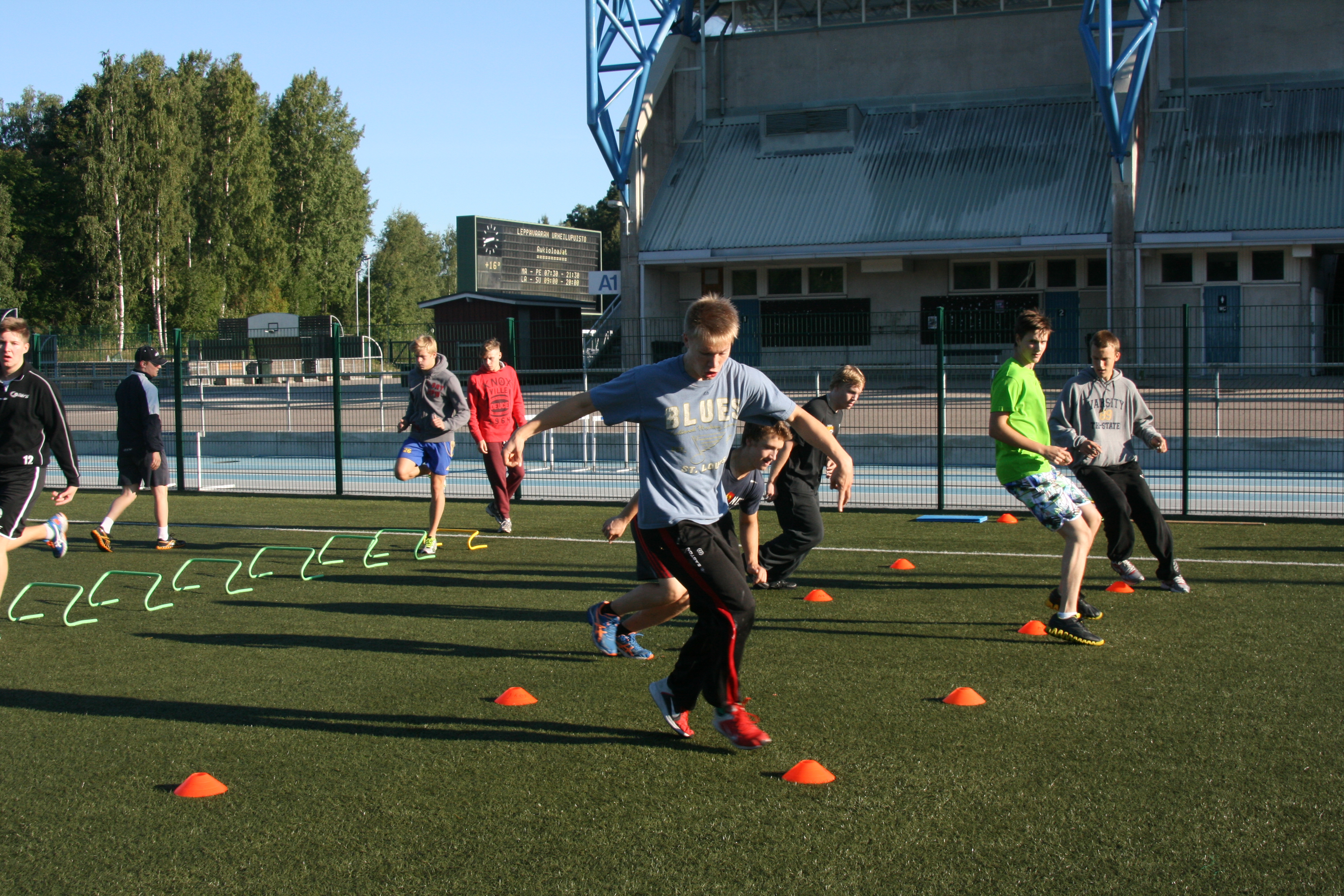 urheilulinjan harjoitukset